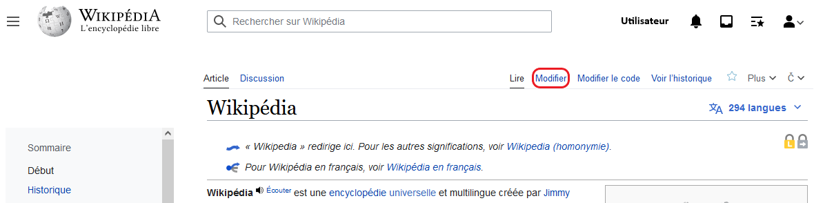 Image mettant en valeur l'onglet "Modifier", pour remplacer Image:Premier pas 2.jpg